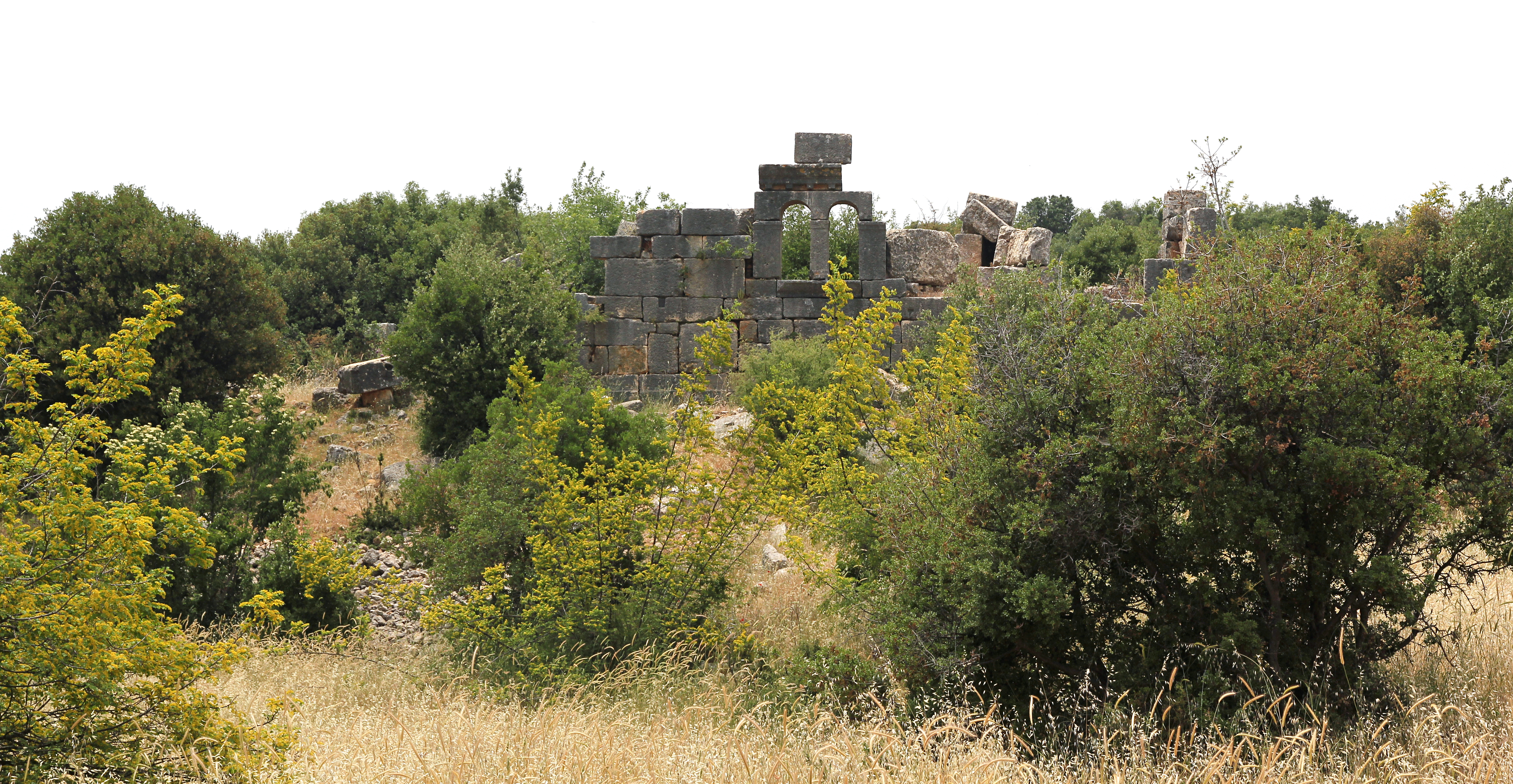 Örendibi, römischer Gutshof bei Sömek in der Umgebung von Erdemli, Südtürkei, Kirche von Osten